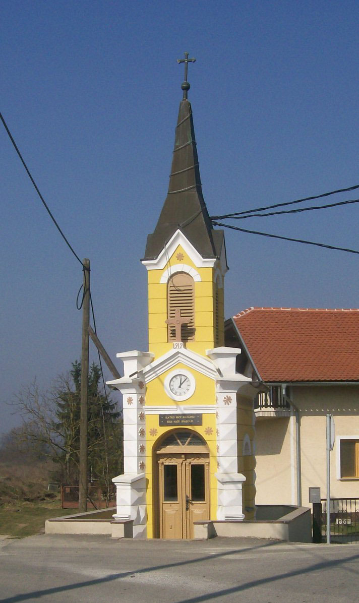 Kapelica u Harmici, općina Brdovec, ZG županija